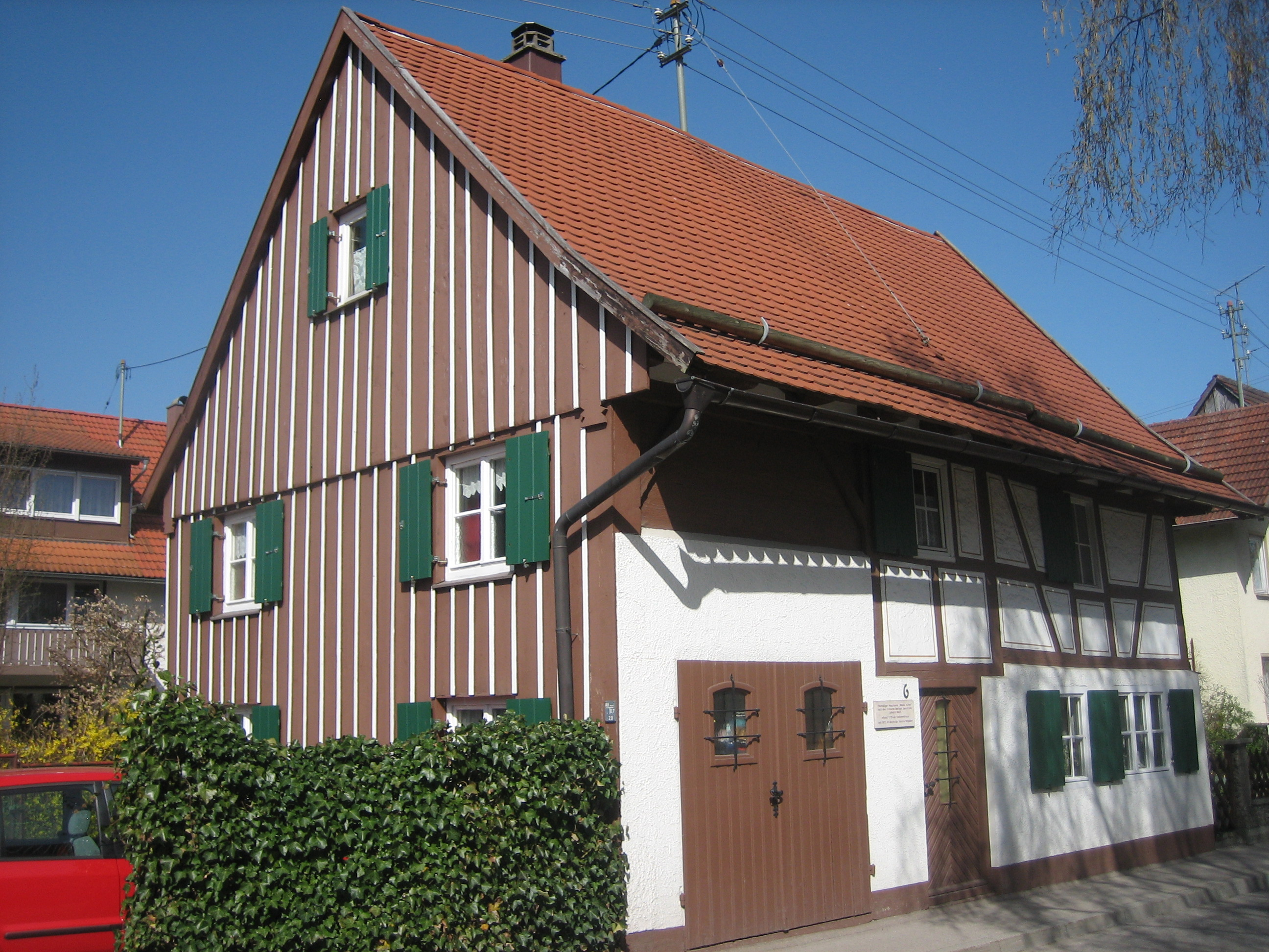 Fachwerkhaus in Woringen, Bayern